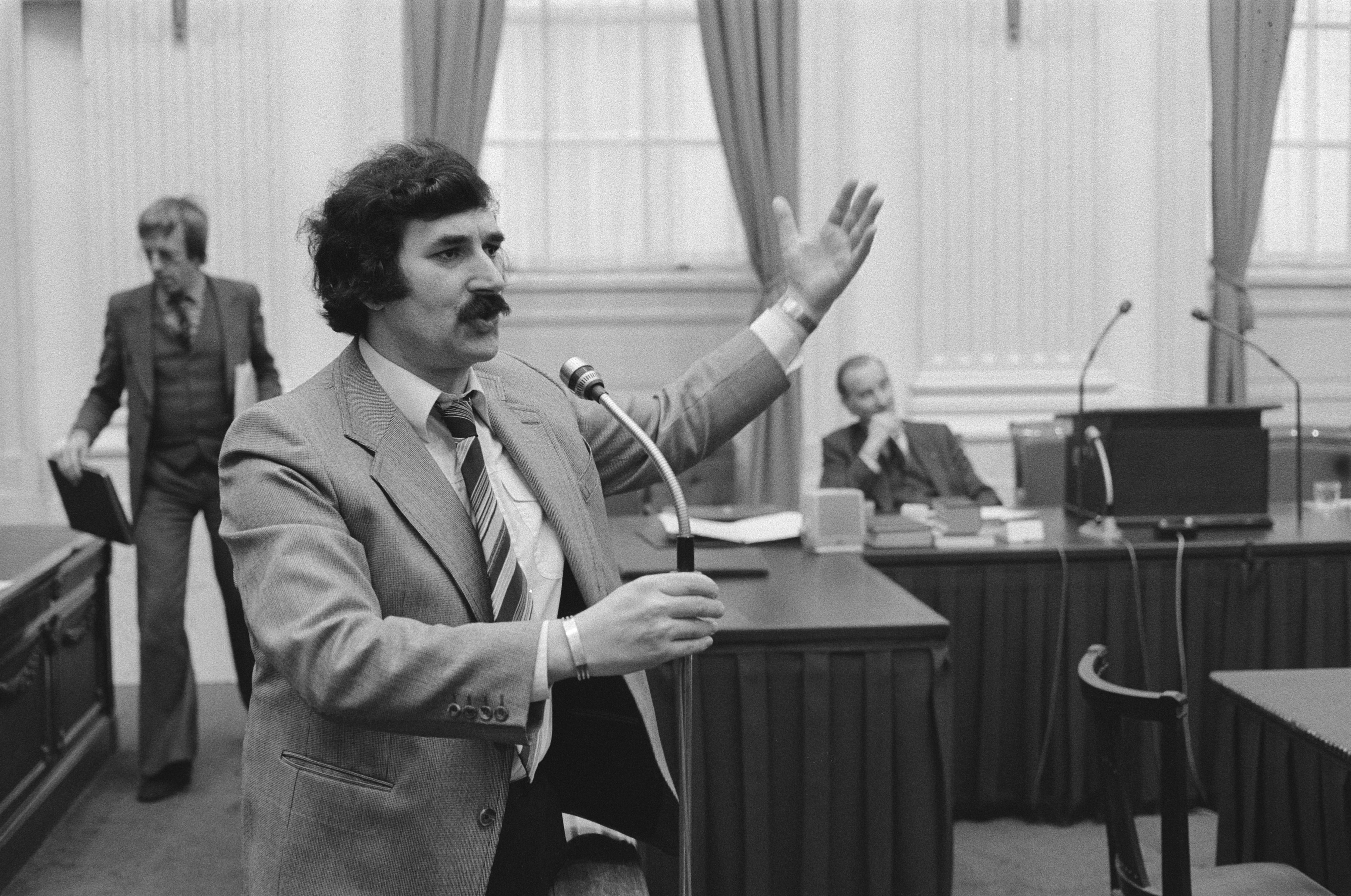 Collectie / Archief : Fotocollectie Anefo Reportage / Serie : [ onbekend ] Beschrijving : Kamerlid Van den Bergh interpelleert Minister van Buitenlandse Zaken Van der Klaauw over opschorten humanitaire hulp vanuit de Europese Gemeenschap aan El Salvador Datum : 19 februari 1981 Locatie : Den Haag, Zuid-Holland Trefwoorden : humanitaire hulp, parlementaire debatten, parlementariërs, politiek Persoonsnaam : Bergh, Harry van den Instellingsnaam : PvdA, Tweede Kamer Fotograaf : Antonisse, Marcel / Anefo Auteursrechthebbende : Nationaal Archief Materiaalsoort : Negatief (zwart/wit) Nummer archiefinventaris : bekijk toegang 2.24.01.05 Bestanddeelnummer : 931-3312